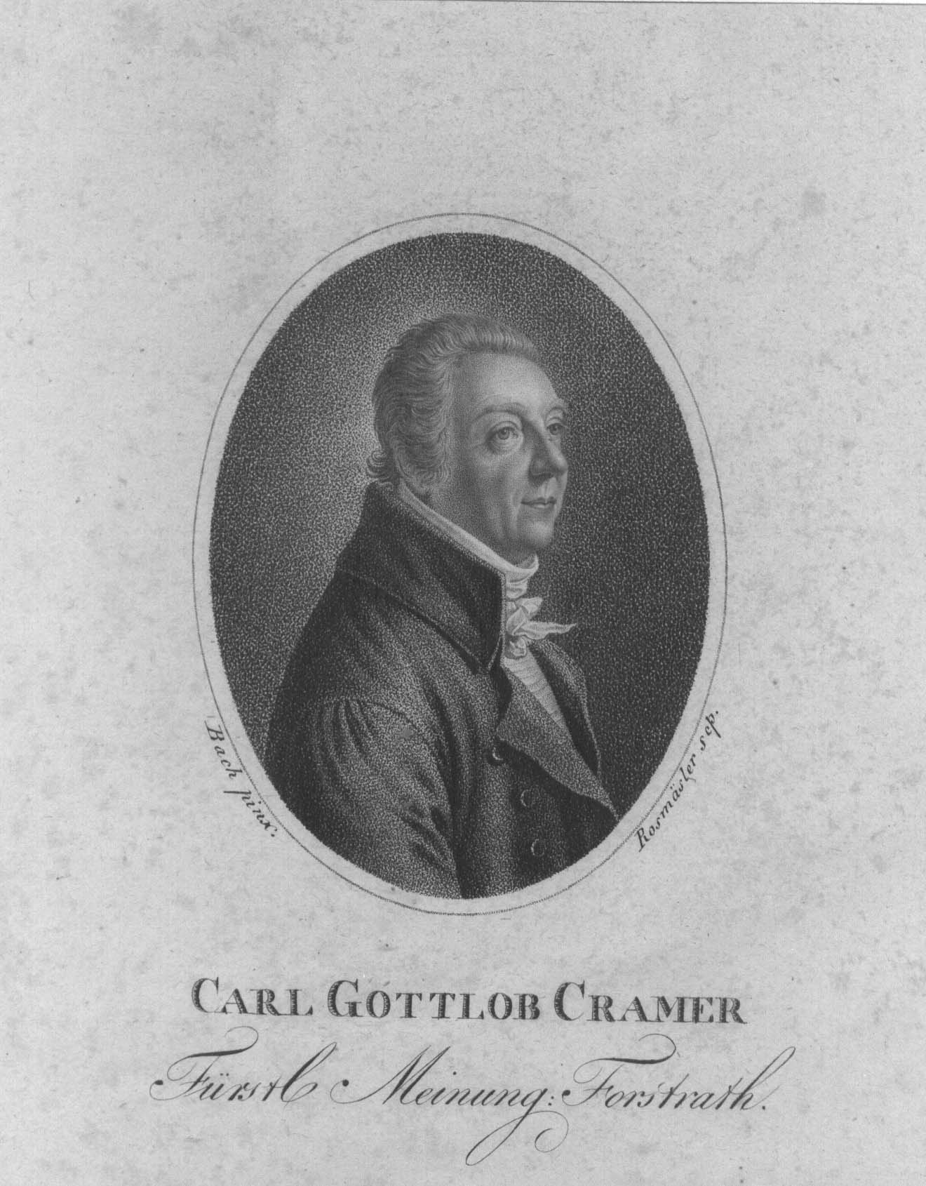 Carl Gottlob Cramer (Porträt)